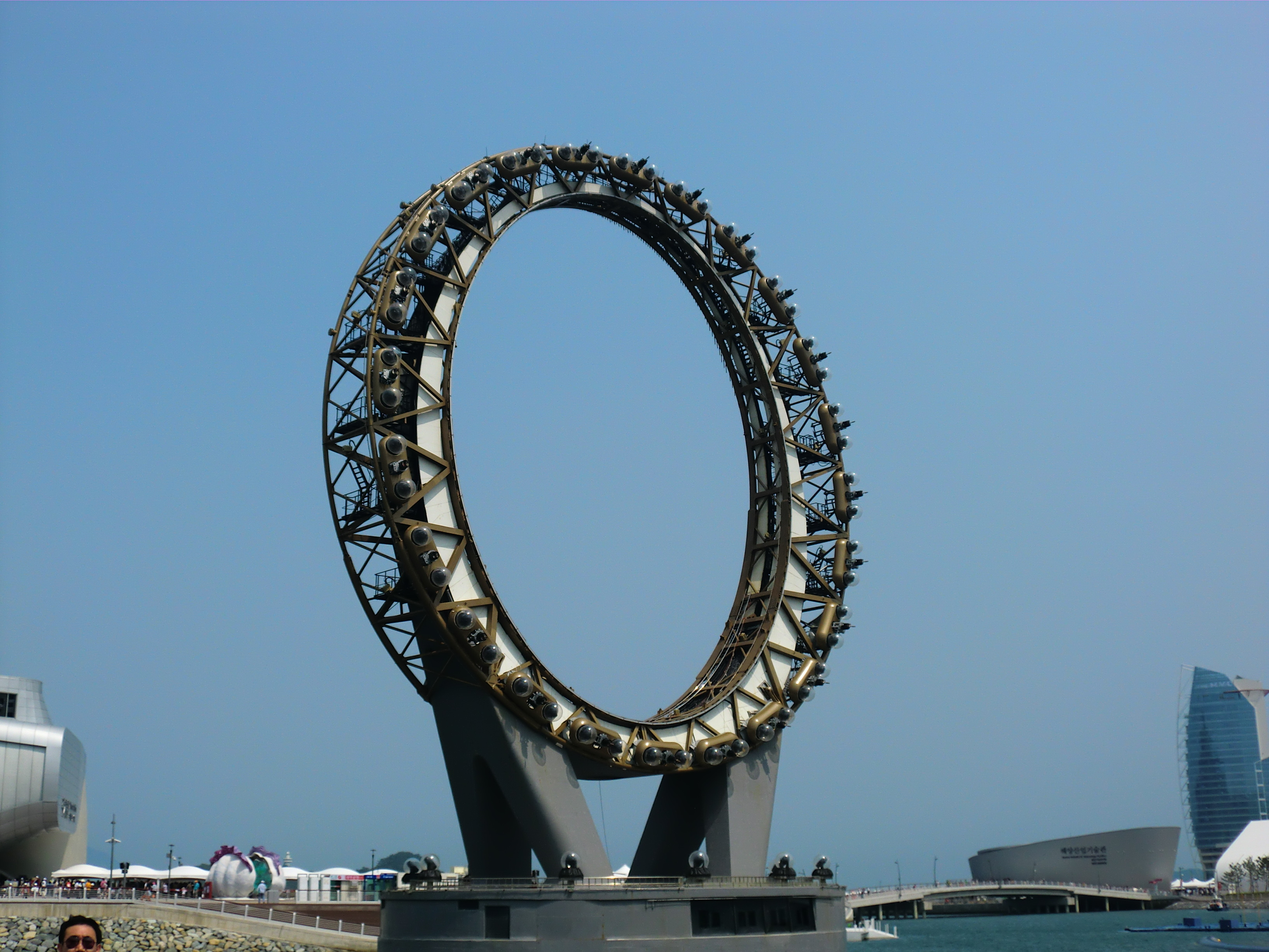 빅-오